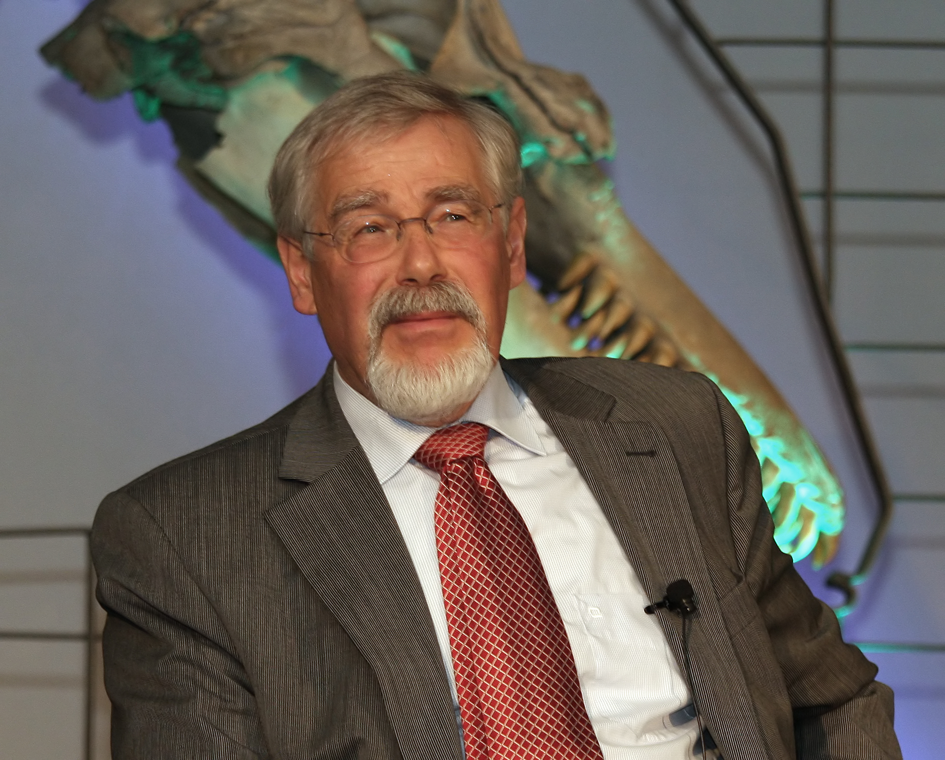 Johannes Fried, deutscher Historiker, Podiumsdiskussion zum Thema „Evolution des Wissens“ anlässlich der Verleihung der Zedler-Medaille 2009 im Senckenberg-Museum in Frankfurt am Main.